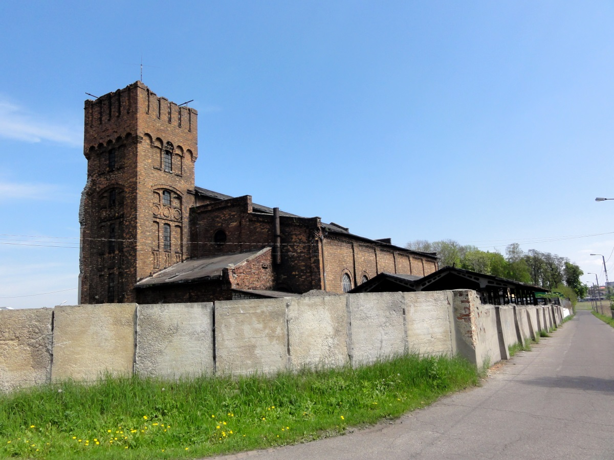 Stara kopalnia na granicy Kazimierza Górniczego i Porąbki